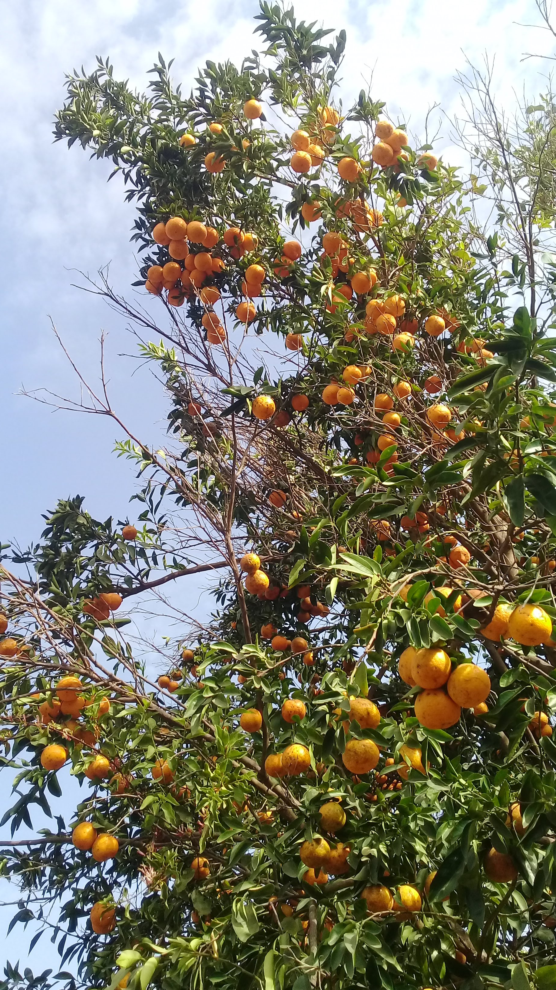 Une bien grande partie du village est recouverte par des plantations de ce type.